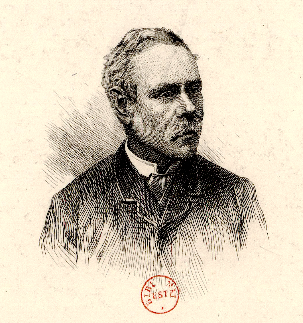 Paul Arbaud (1831–1911), French book collector and philanthropist.